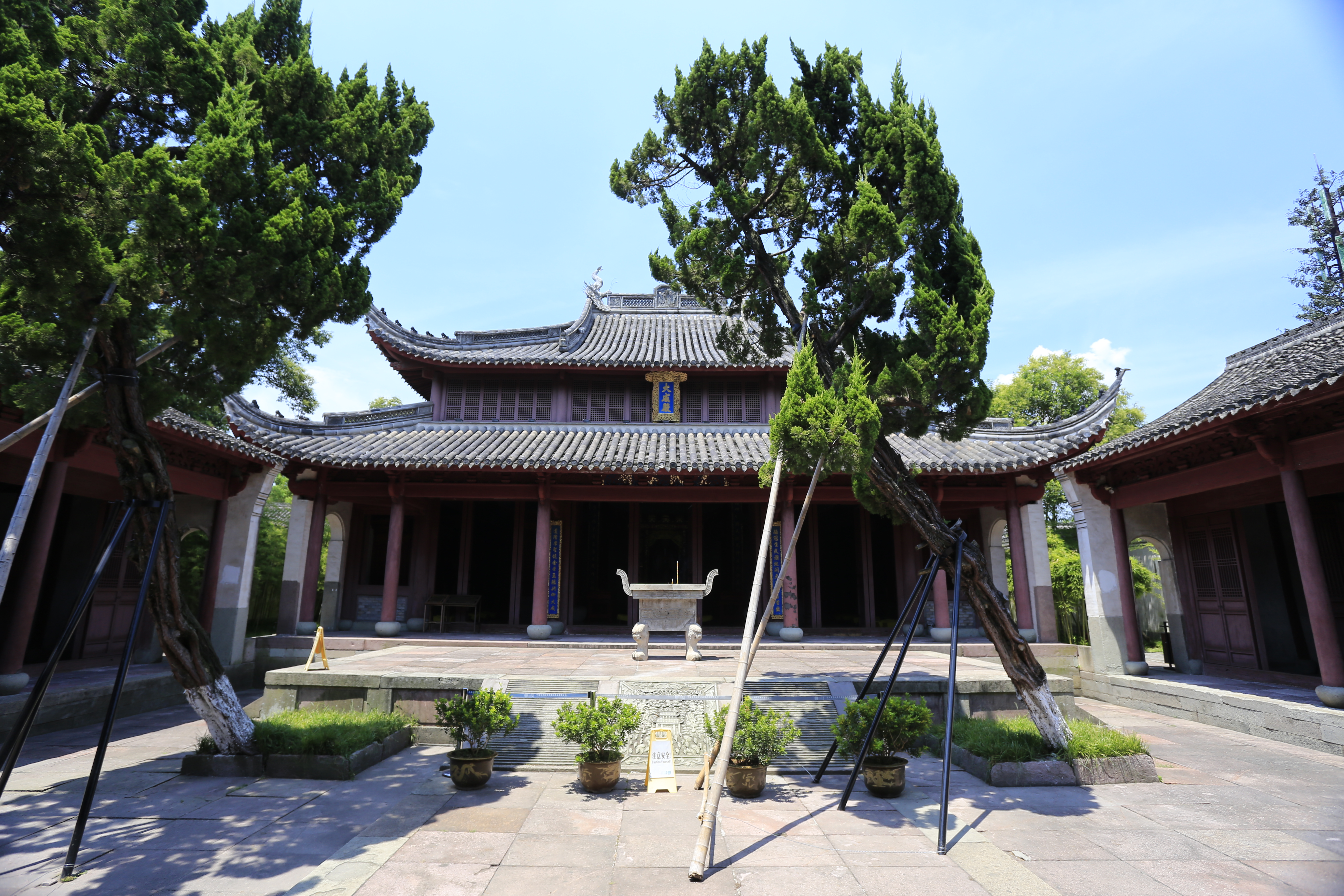 宁波市慈城孔庙 —— 大成殿